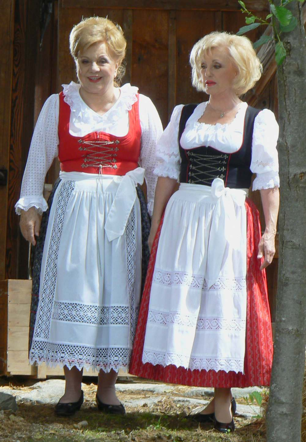 Maria (links) und Margot Hellwig (rechts) bei einem Auftritt im Europapark Rust